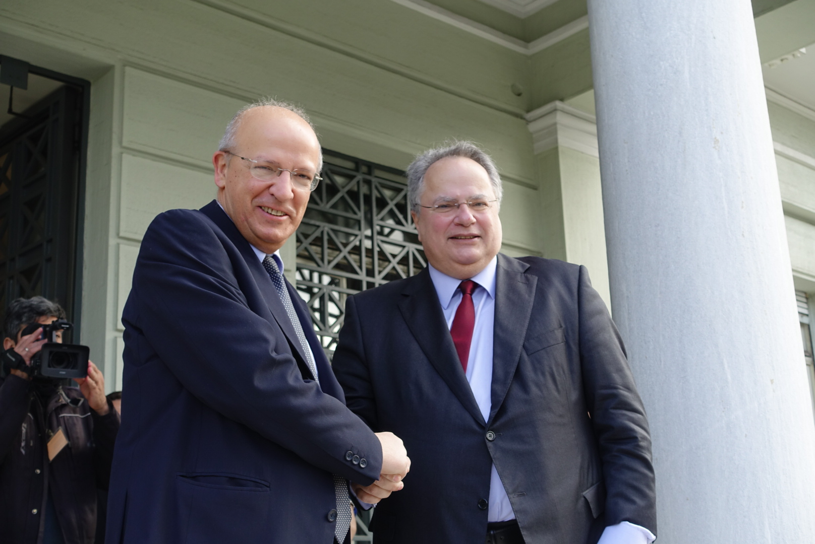 Ο Υπουργός Εξωτερικών, κ. Νίκος Κοτζιάς, θα συναντηθεί τη Δευτέρα 11 Απριλίου με τον Πορτογάλο ομόλογό του, κ. Augusto Santos Silva, στο πλαίσιο της επίσημης επίσκεψης που πραγματοποιεί ο Πρωθυπουργός της Πορτογαλίας, António Costa, στην Ελλάδα.